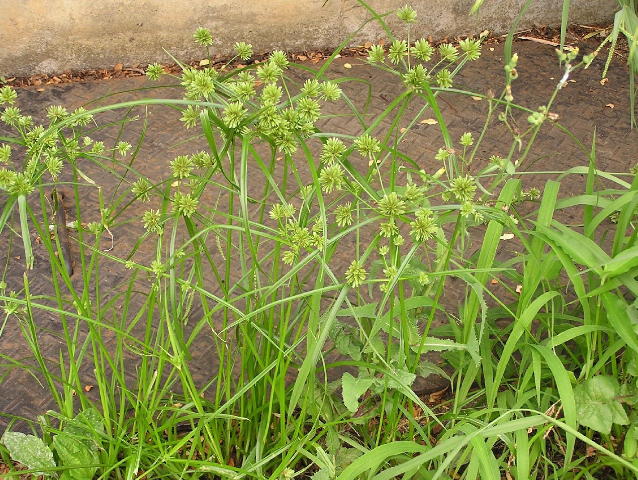 Cyperus eragrostis neben einem Reisfeld in Shiga-ken (Japan).